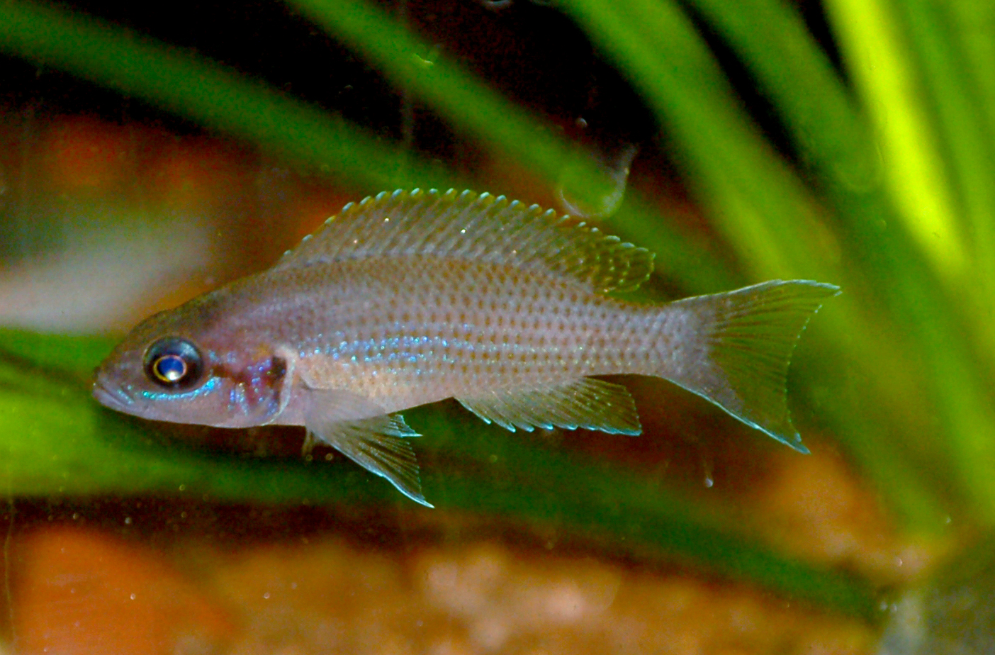 Neolamprologus olivaceus female